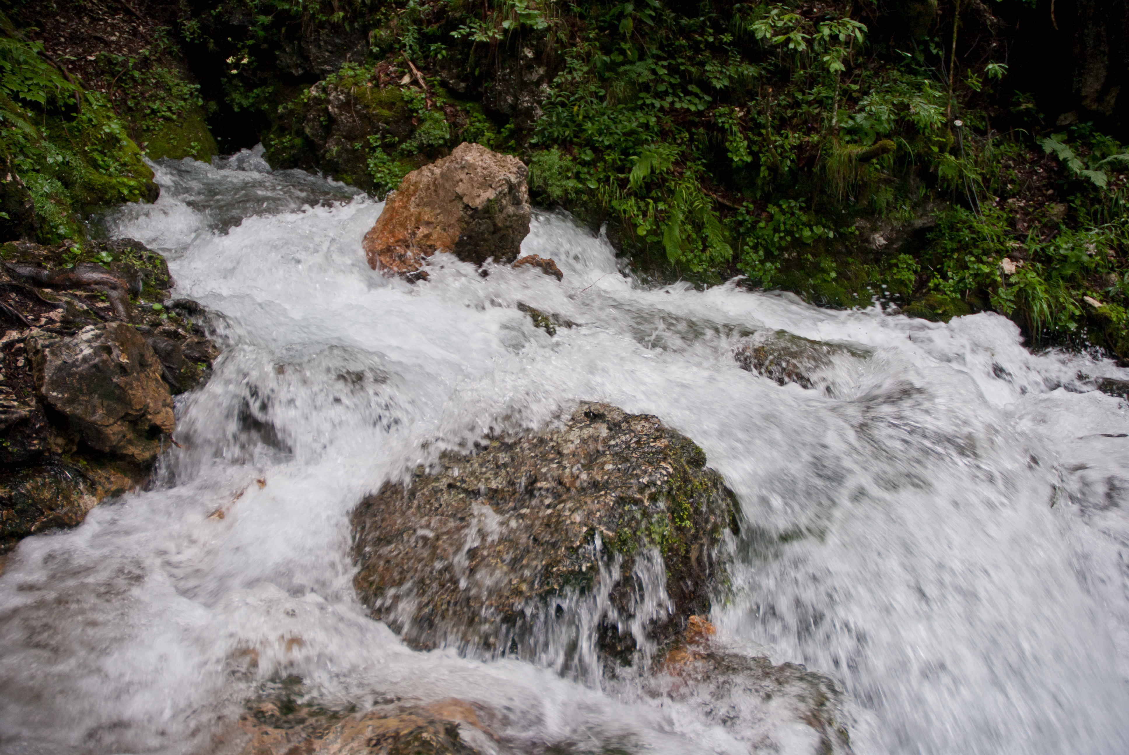 Großeggerquelle an der Mendling am Fuß des Scheibenbergs, Nummer im Höhlenkataster: 1821/42